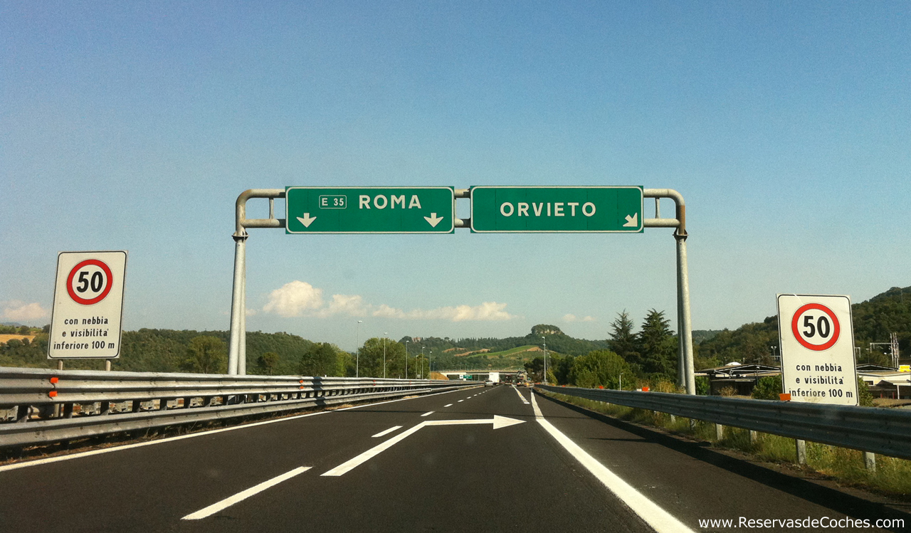 L'uscita di Orvieto sull'autostrada A1 (strada europea E35).